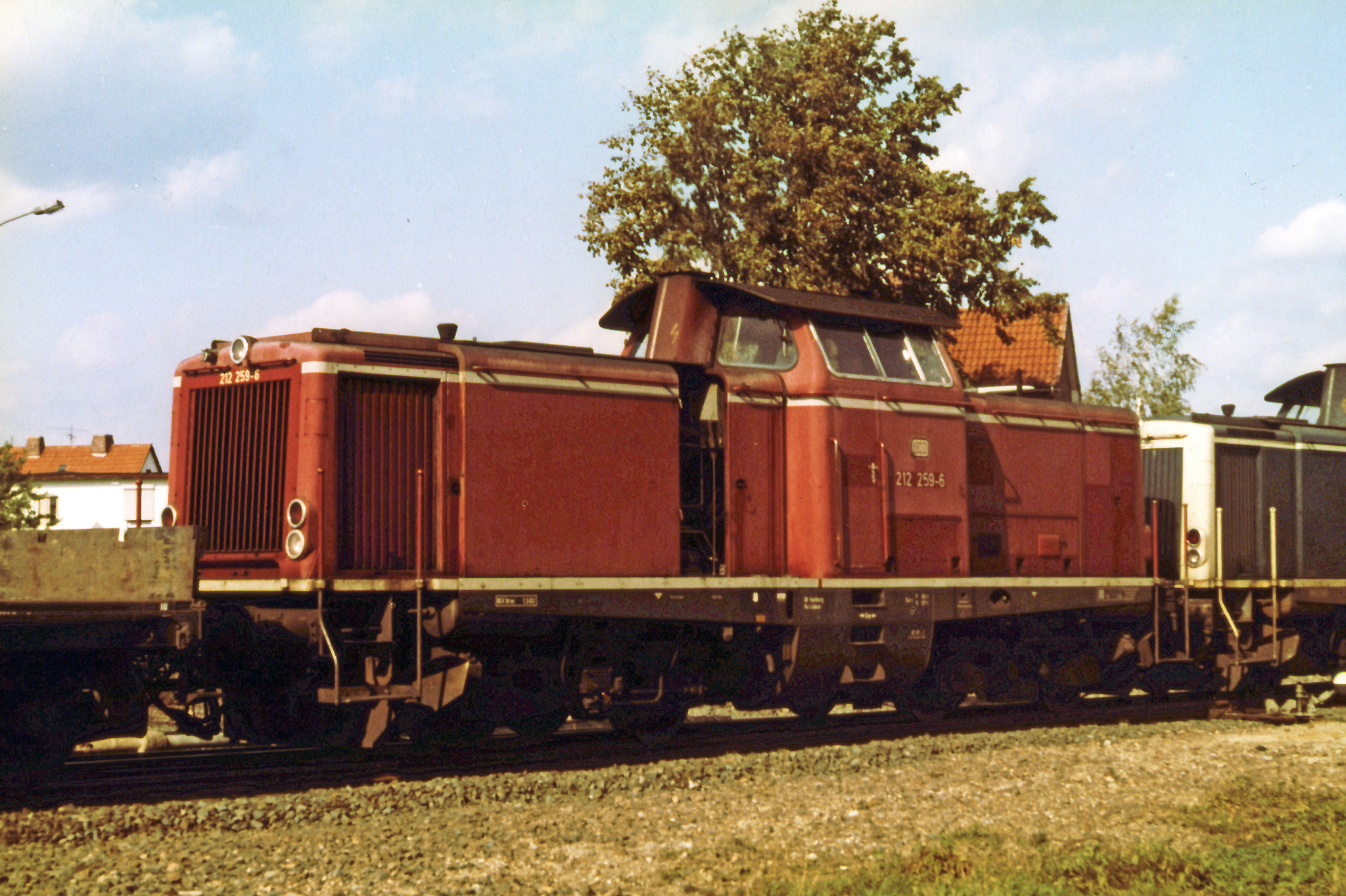 Diesellokomotive 212 259-6 rangiert in Doppeltraktion mit Diesellokomotive 212 245-4 im Bahnhof Lüchow.